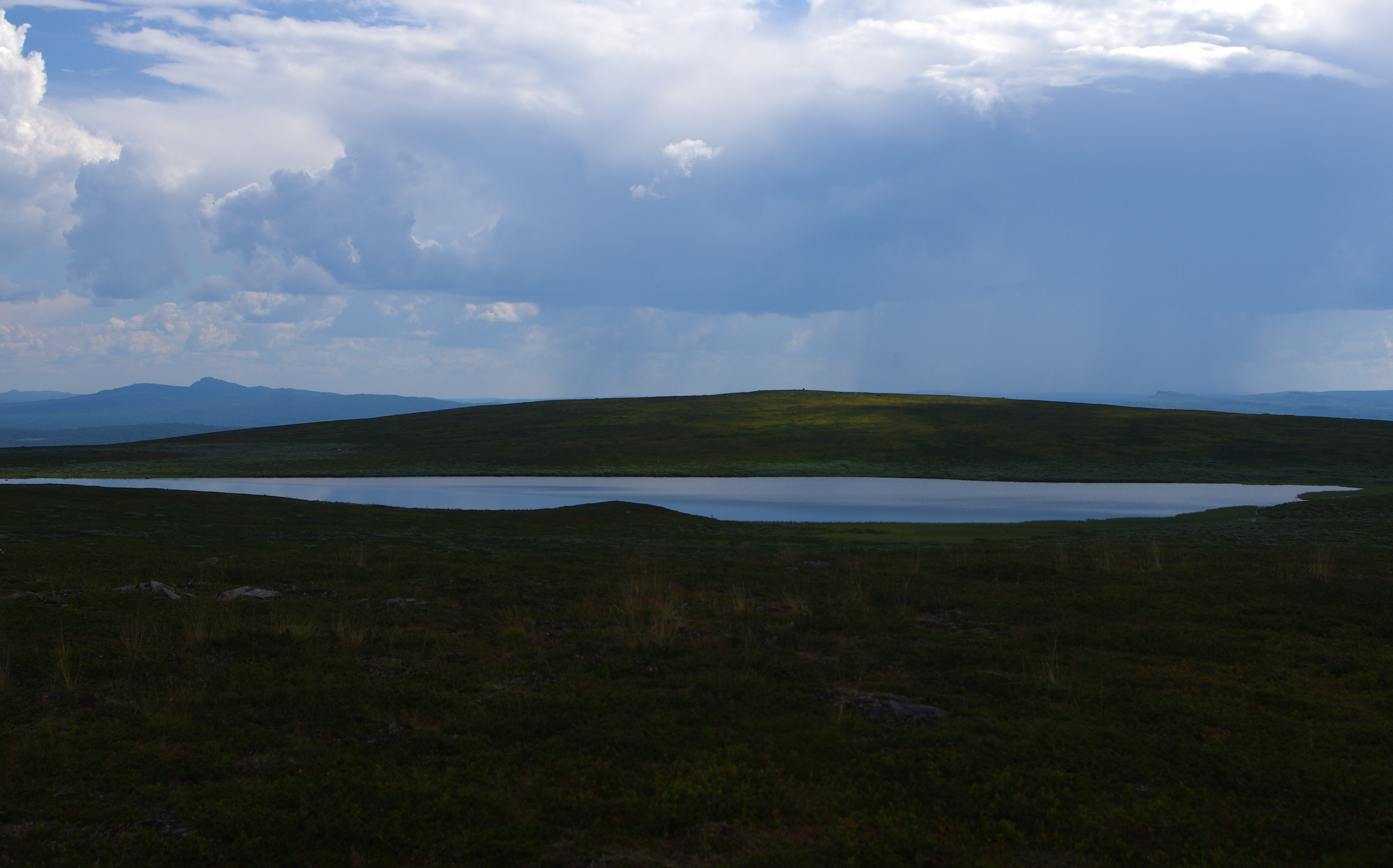 Gieråivetjärnen eller (Gieråjvjávrátje) är en sjö i Sorsele kommun i Lappland. Kungsleden passerar sjön.